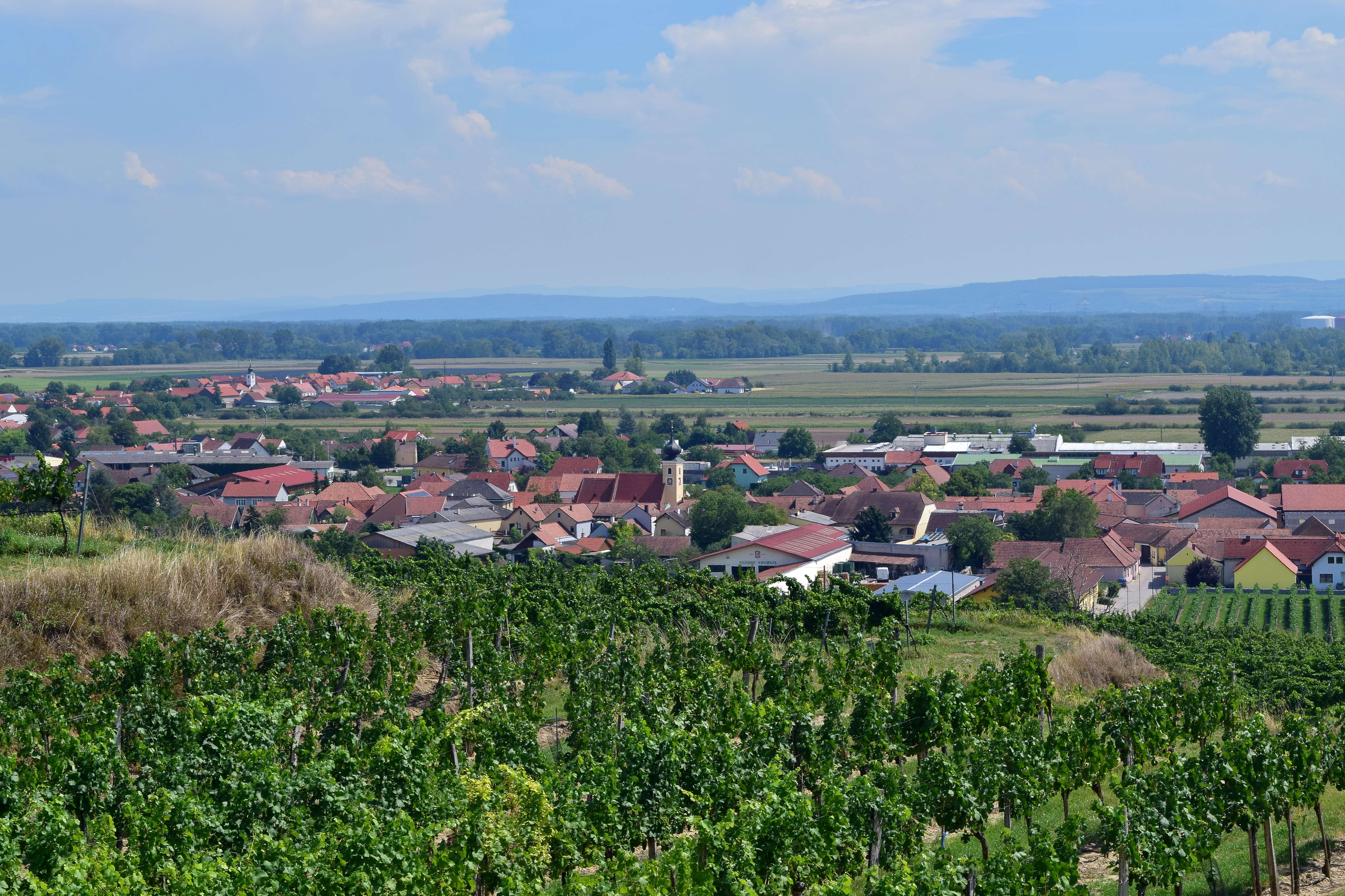 Ortsansicht von Gedersdorf